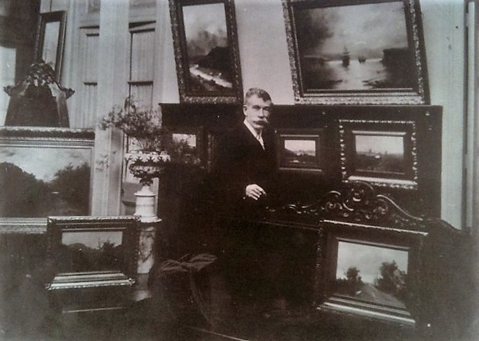 Fotografía de Enrique Swinburn Kirk en su taller, cerca de 1910; nació en Santiago de Chile, el 2 de octubre de 1859, y falleció en la misma ciudad el 22 de octubre de 1929. Fue un destacado pintor, dibujante y cronista chileno.